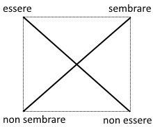 Quadrato della veridizione, essere e sembrare e loro articolazione